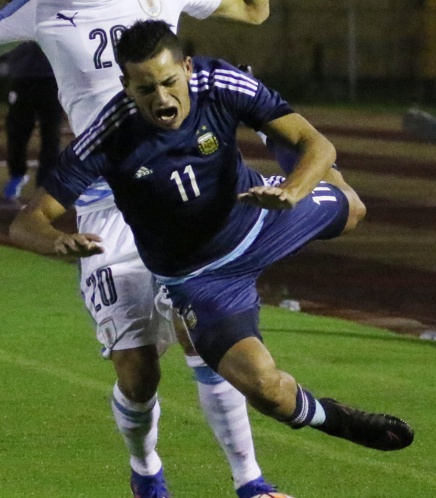 ARGENTINA URUGUAY 4 MAV